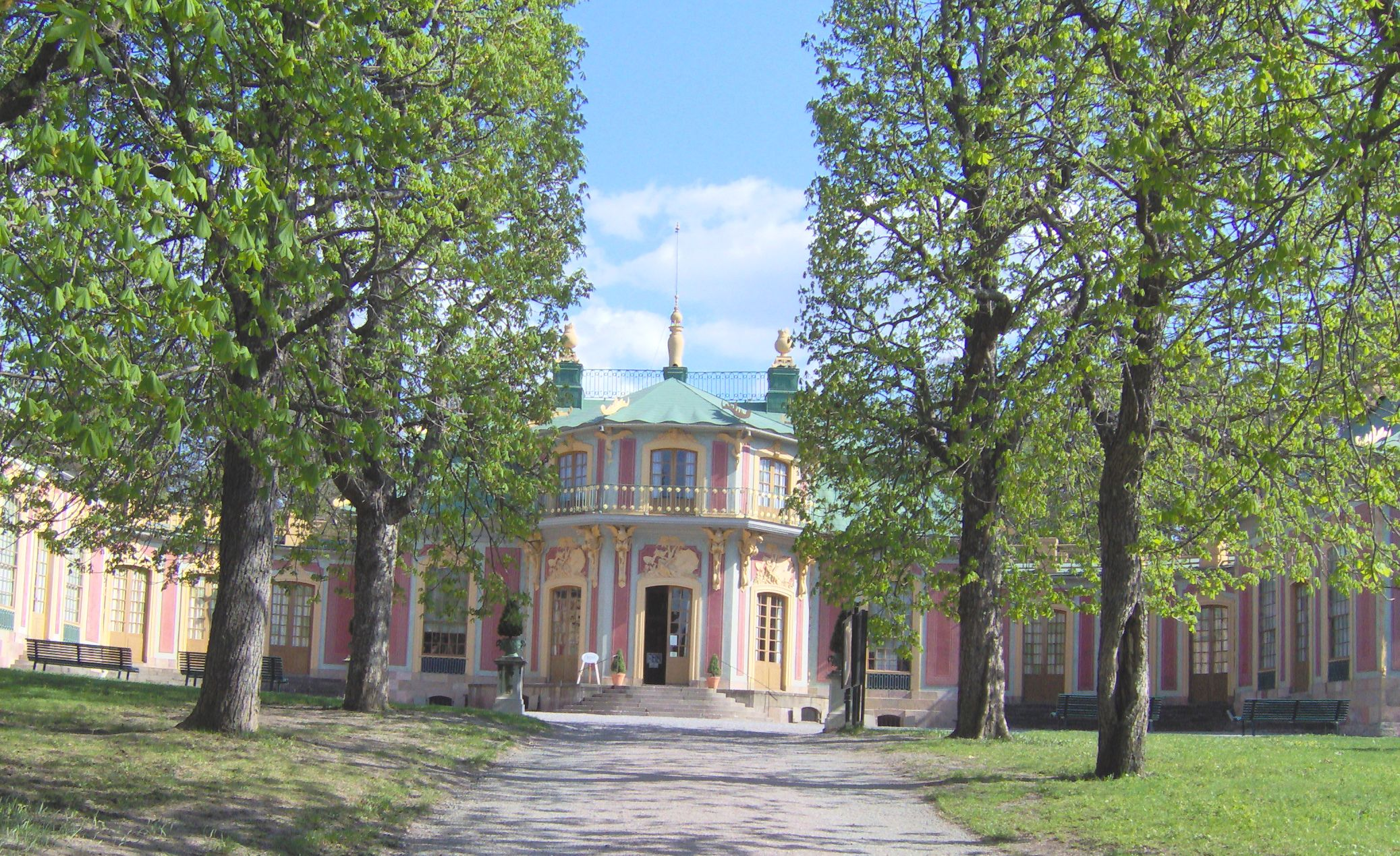 Kina slott vid Drottningholms slott, Stockholm, Sweden. China castle at Drottninghoms castle, Stockholm, Sweden